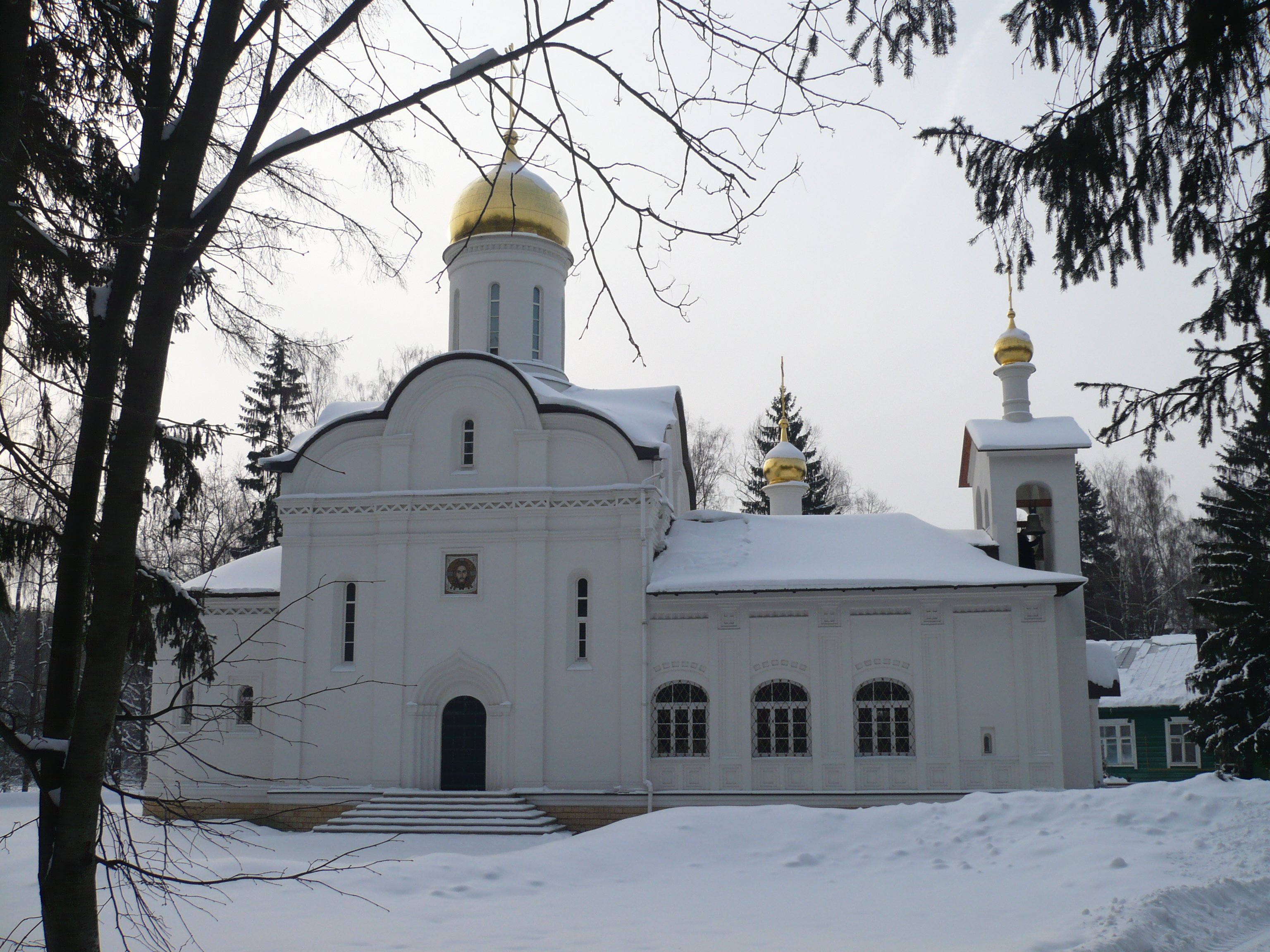 Храм Святых Новомучеников и Исповедников Российских в Коммунарке